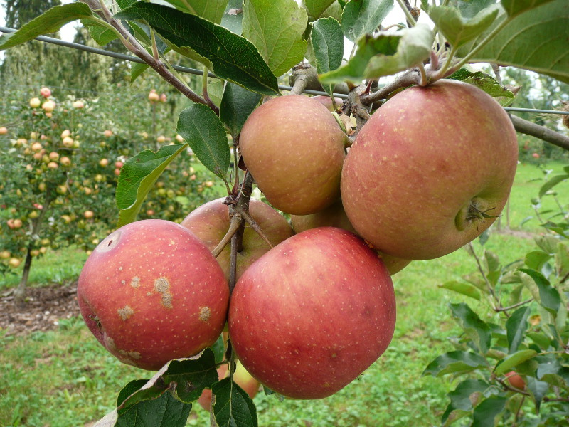 apple cultivar 'Rubinette' at Botanischer Obstgarten Heilbronn